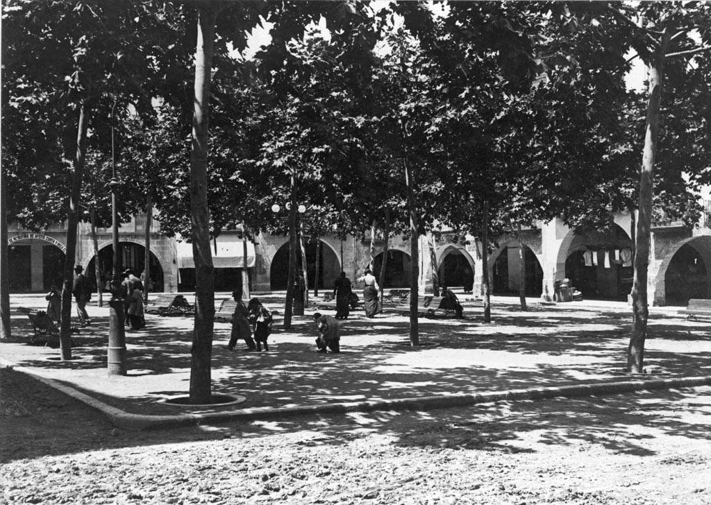 Plaça de la Constitució amb arbres, nens jugant i gent. Juli Vintró i Casallachs (Entre 1890 i 1911)